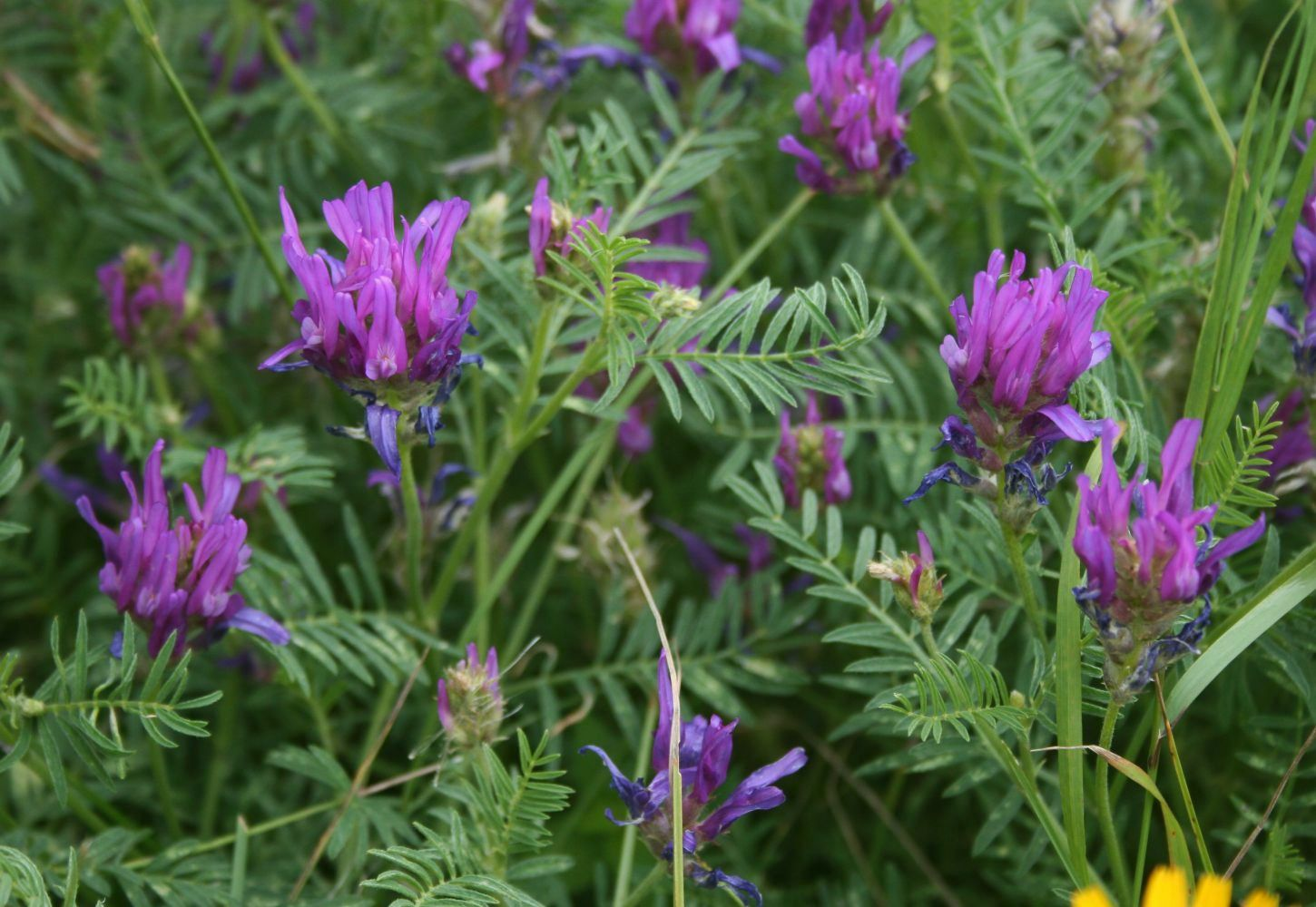 Langfahnen-Tragant (Astragalus onobrychis), Hülsenfrüchtler (Fabaceae), Schmetterlingsblütler (Faboideae) - Österreich/Austria/Autriche: Niederösterreich, Eichkogel S Mödling